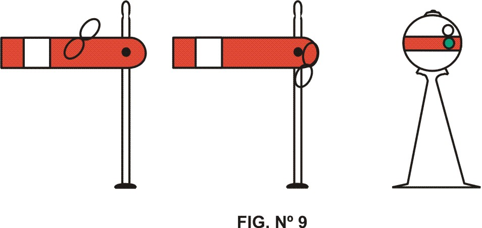 Es un dibujo de tres señales enanas, son iguales a las de maniobras, pero si la vía esta gobernada por una señal absoluta, las enanas se obvian.